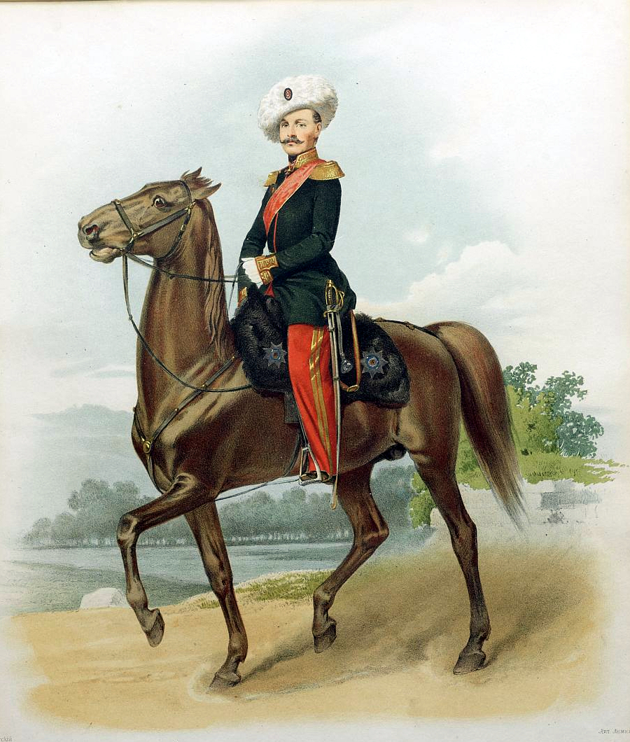 Генерал, числящийся в Армейских Казачьих частях. (В парадной форме) 18 марта 1855 года.